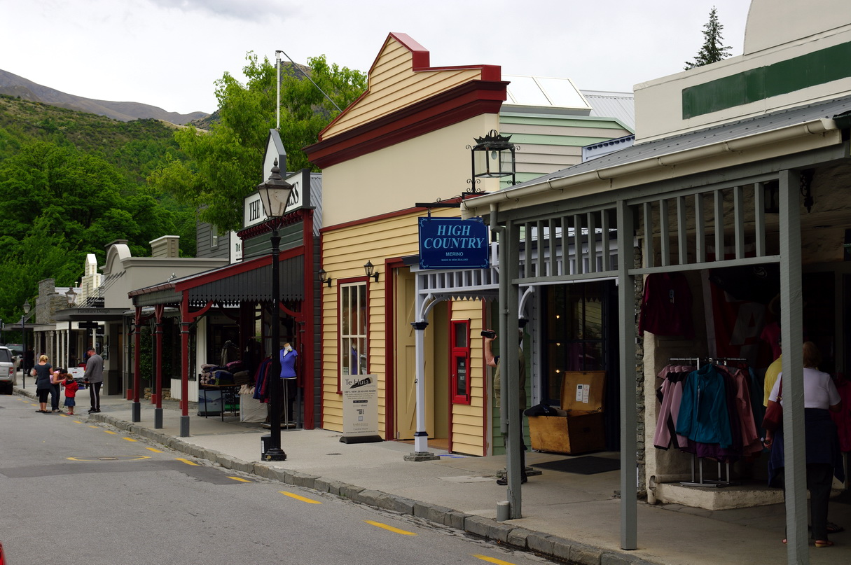 Buckingham Street Arrowtown, NZL